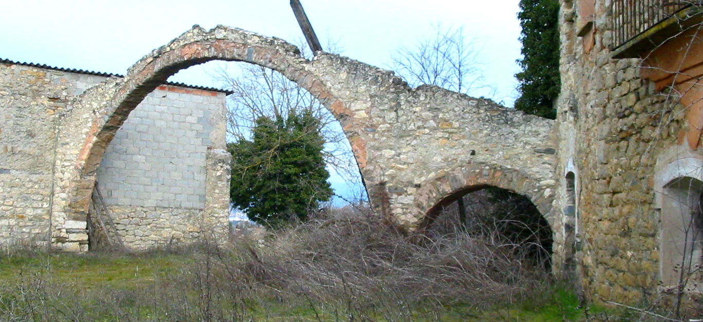 Samitier, A Fueba, Uesca, Aragón